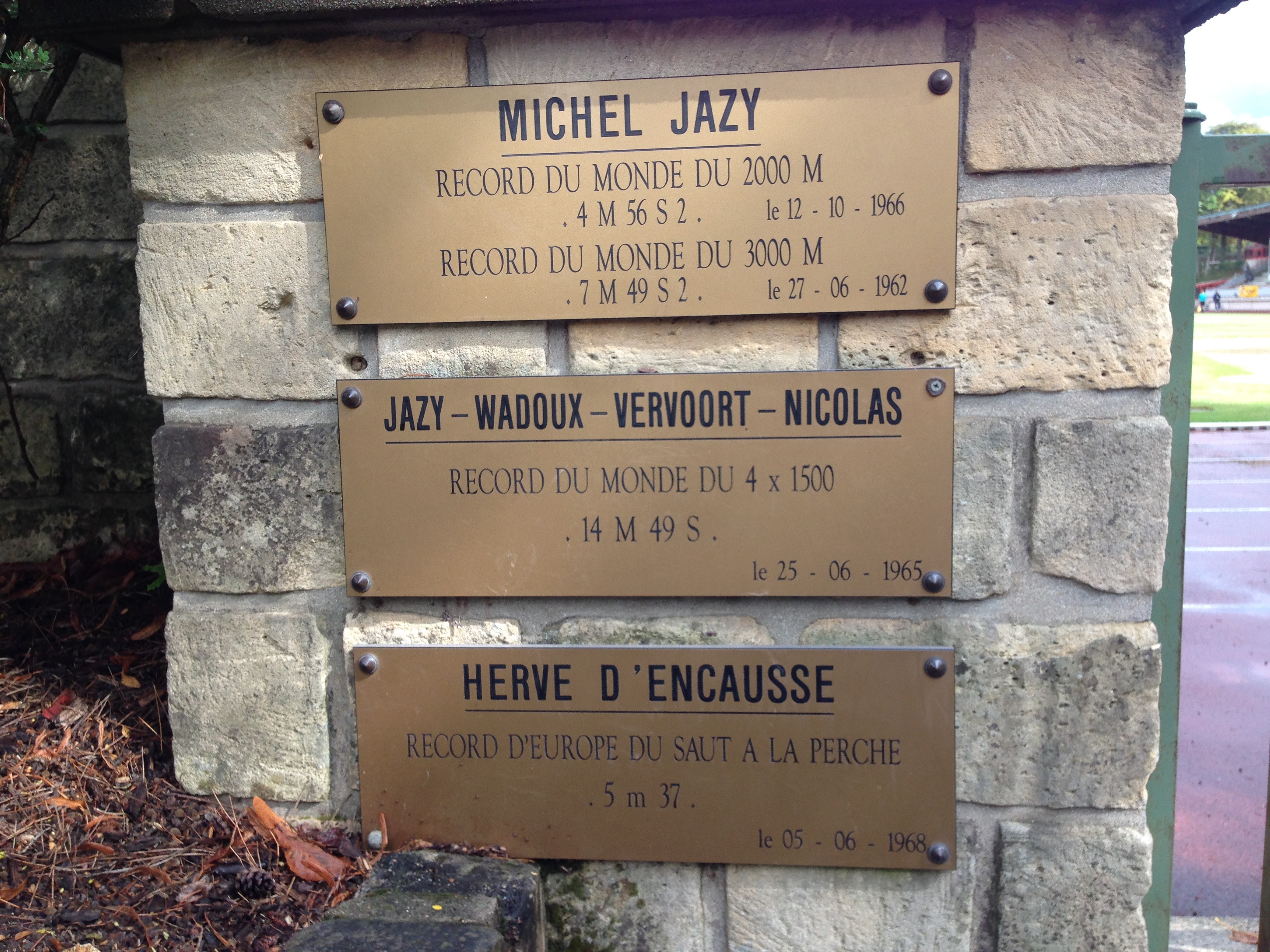 Plaque commémorant trois records du monde et un record d'Europe d'athétisme battus au stade Chéron